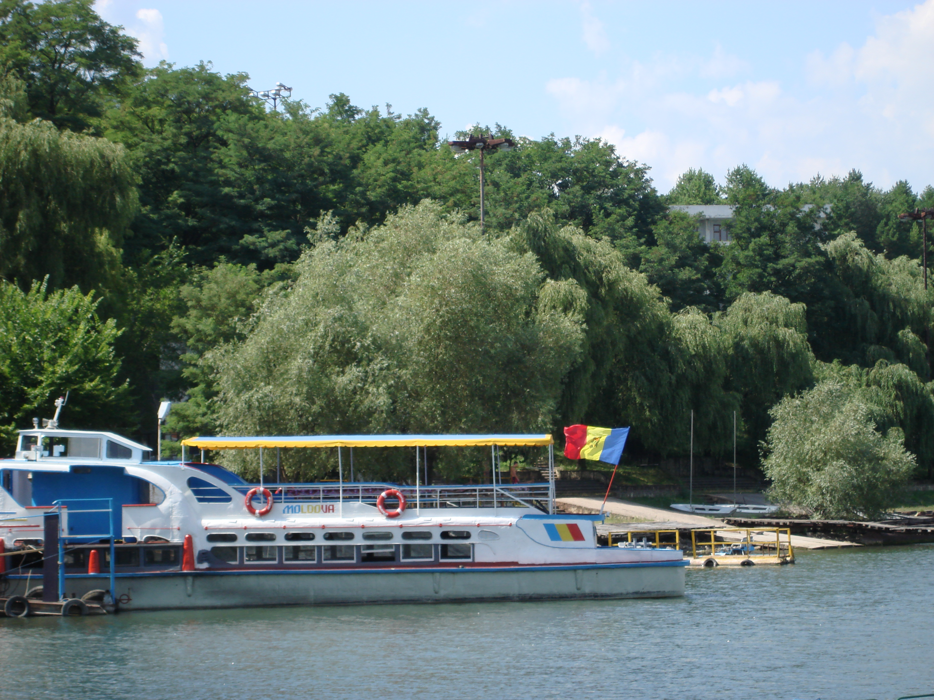 Гидигичское водохранилище